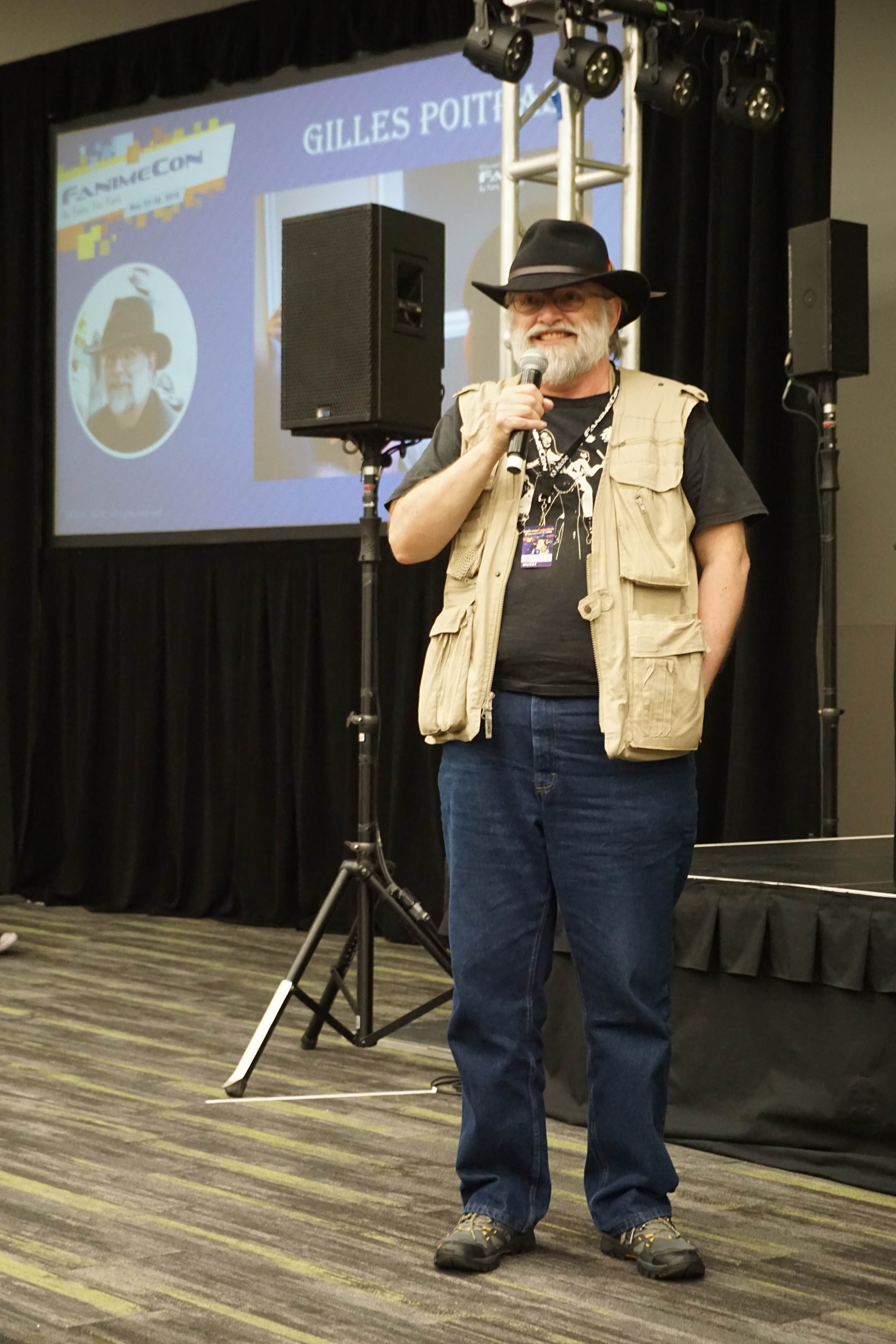 FanimeCon 2018 705